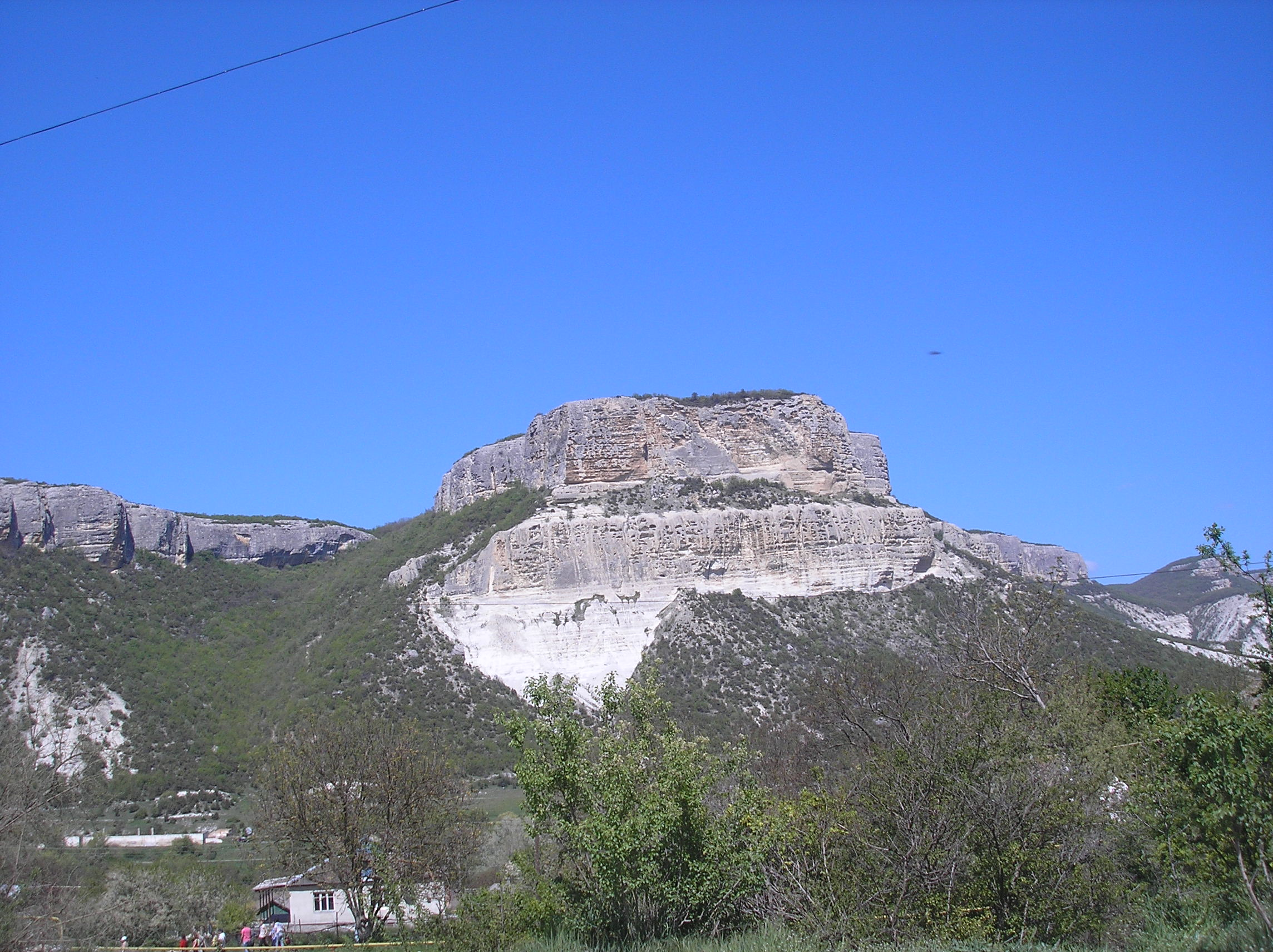 Село Велике Садове, Бахчисарайський район, Крим